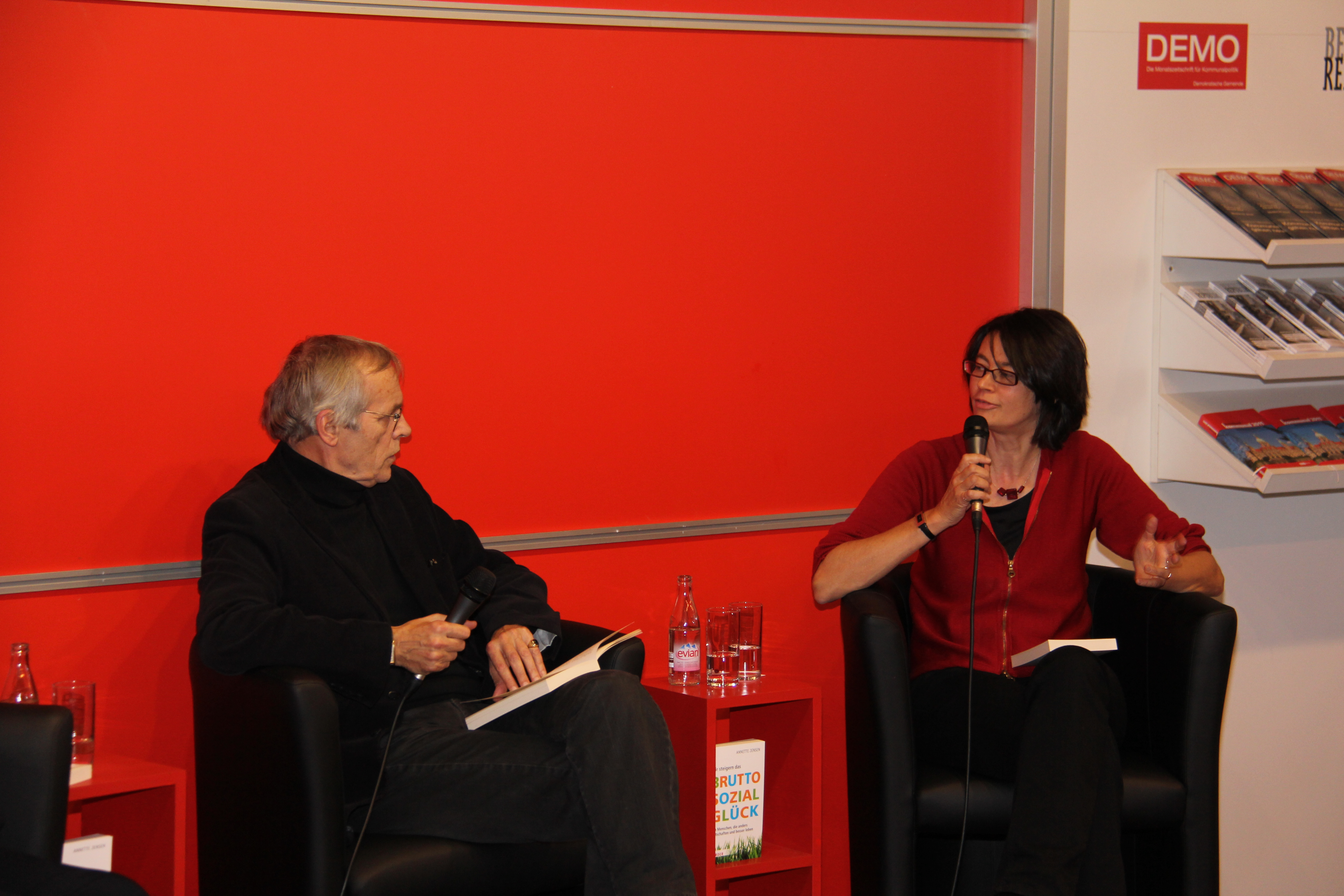 Jörg Hafkemeyer und Annette Jensen auf der Frankfurter Buchmesse 2011